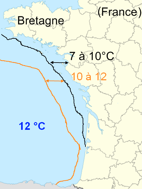 Température de la mer de la côte française le 9 janvier 2009 après un grand épisode très froid en France d'environ 15 jours (vent de nord est), grande différence jusqu'à 5°C de l'eau.